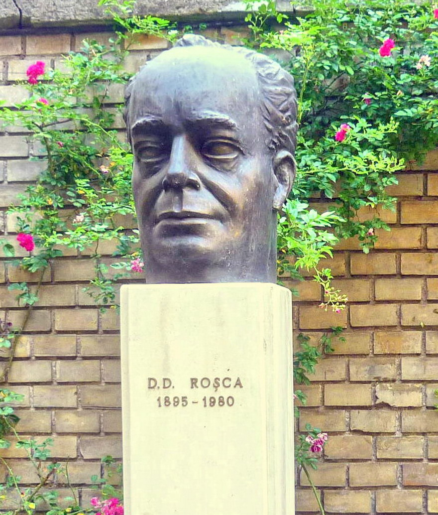 Bustul lui D.D.Roşca din "Parcul Memoriei Universitare" în curtea Universităţii Babeş-Bolyai Cluj-Napoca, România.